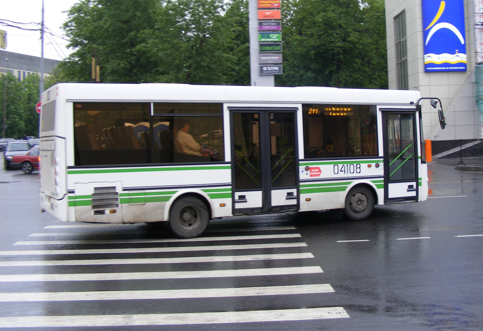 ПАЗ-3237 у бывшего метро "Измайловский парк" ("Партизанская"), в безымянном проезде, примыкающем к Измайловскому шоссе. Справа киоск "ТЦ Альбатрос" (Измайловское 69), слева видна серая масса "ТЦ АСТ" (Измайловское 71).